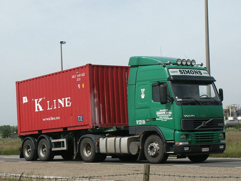 Volvo FH12 mit Containerauflieger